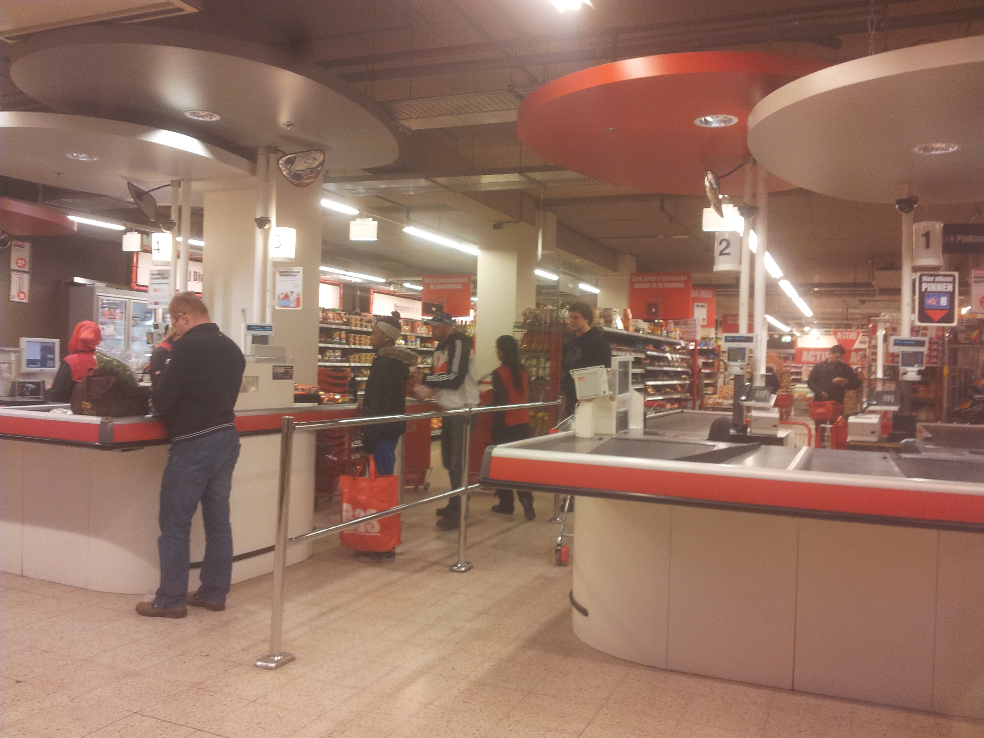 Een Dirk supermarkt in Rotterdam (Pinkstraat). Voorheen een Bas van der Heijden.